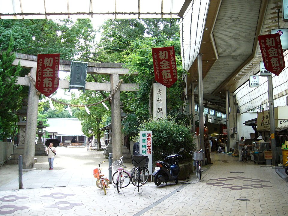 能勢街道（右手）と原田神社。